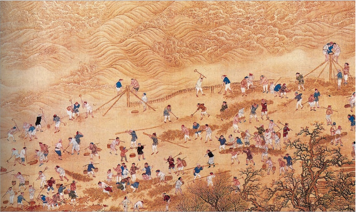 康熙帝南巡图卷，治黃河